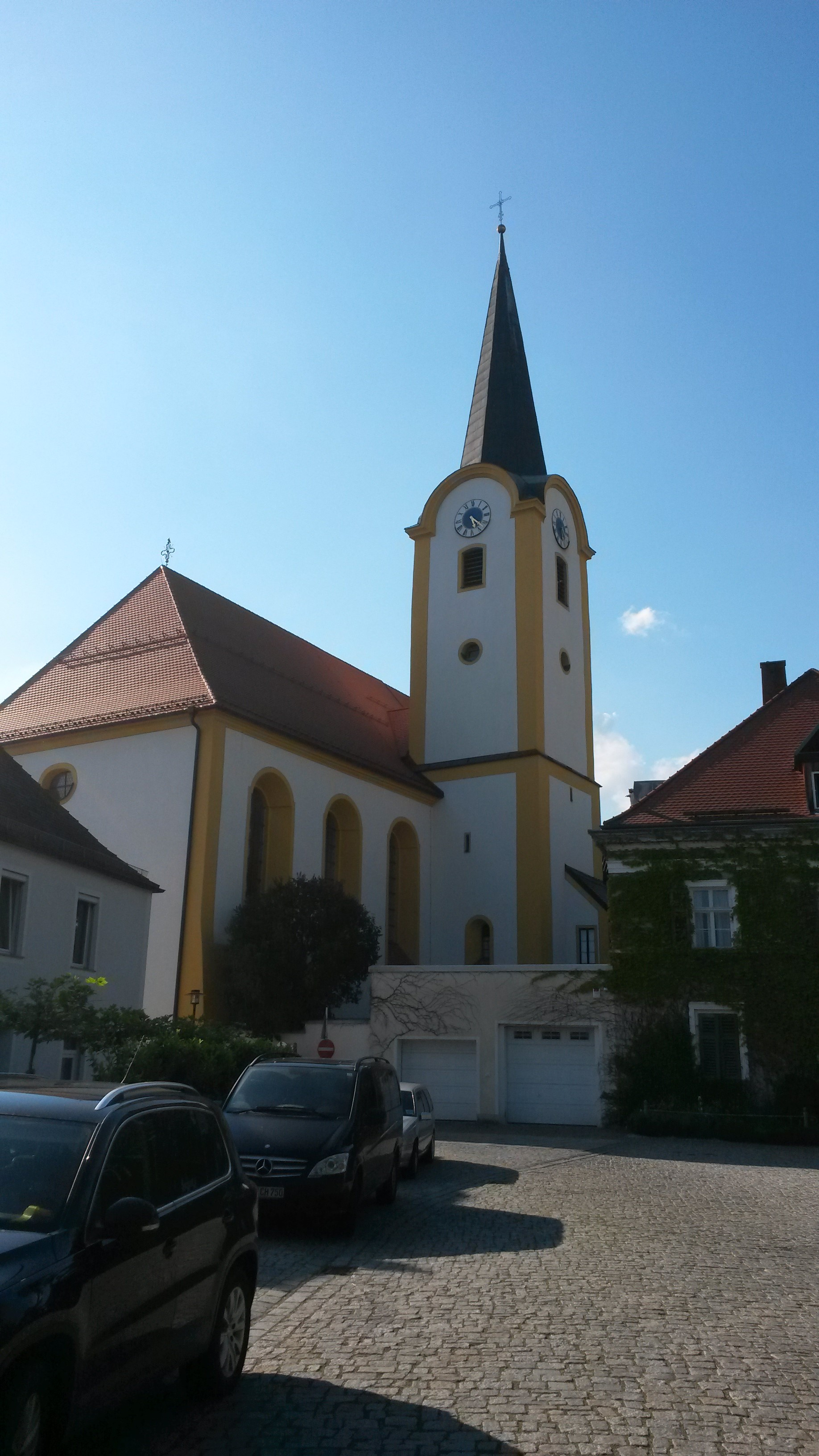 Ansicht von außen